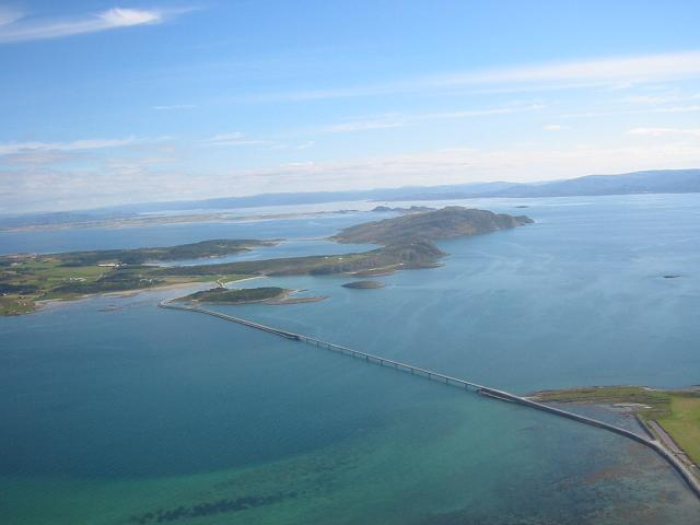 Kråkvågbrua mellom øyene Storfosna og Kråkvåg i Ørland (Bridge between islands Kråkvåg and Storfosna in Ørland, Sør-Trøndelag, Norway)